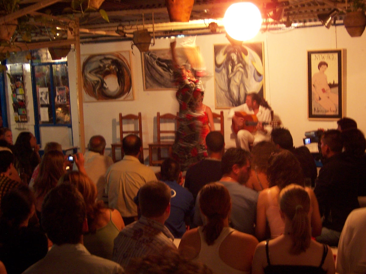 Tablao flamenco camera: Kodak DX7440 Source: *Daniel Csorfoly